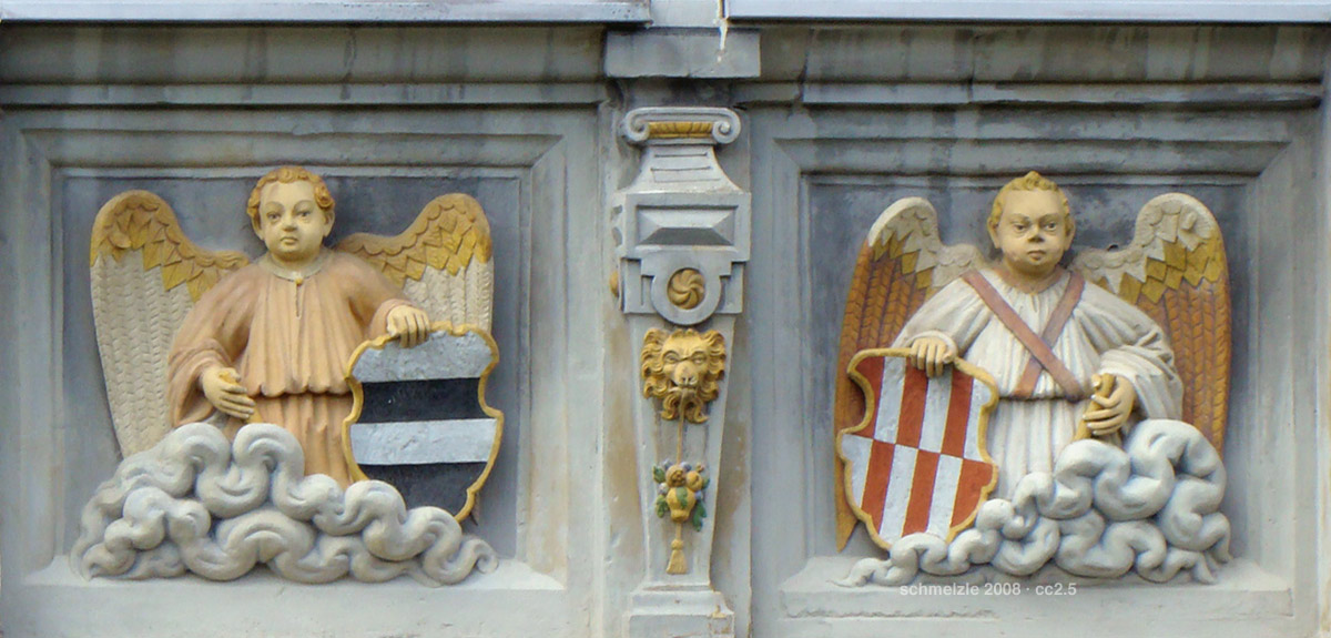 Wappenfiguren beim Torhaus von Schloss Liebenstein bei Neckarwestheim